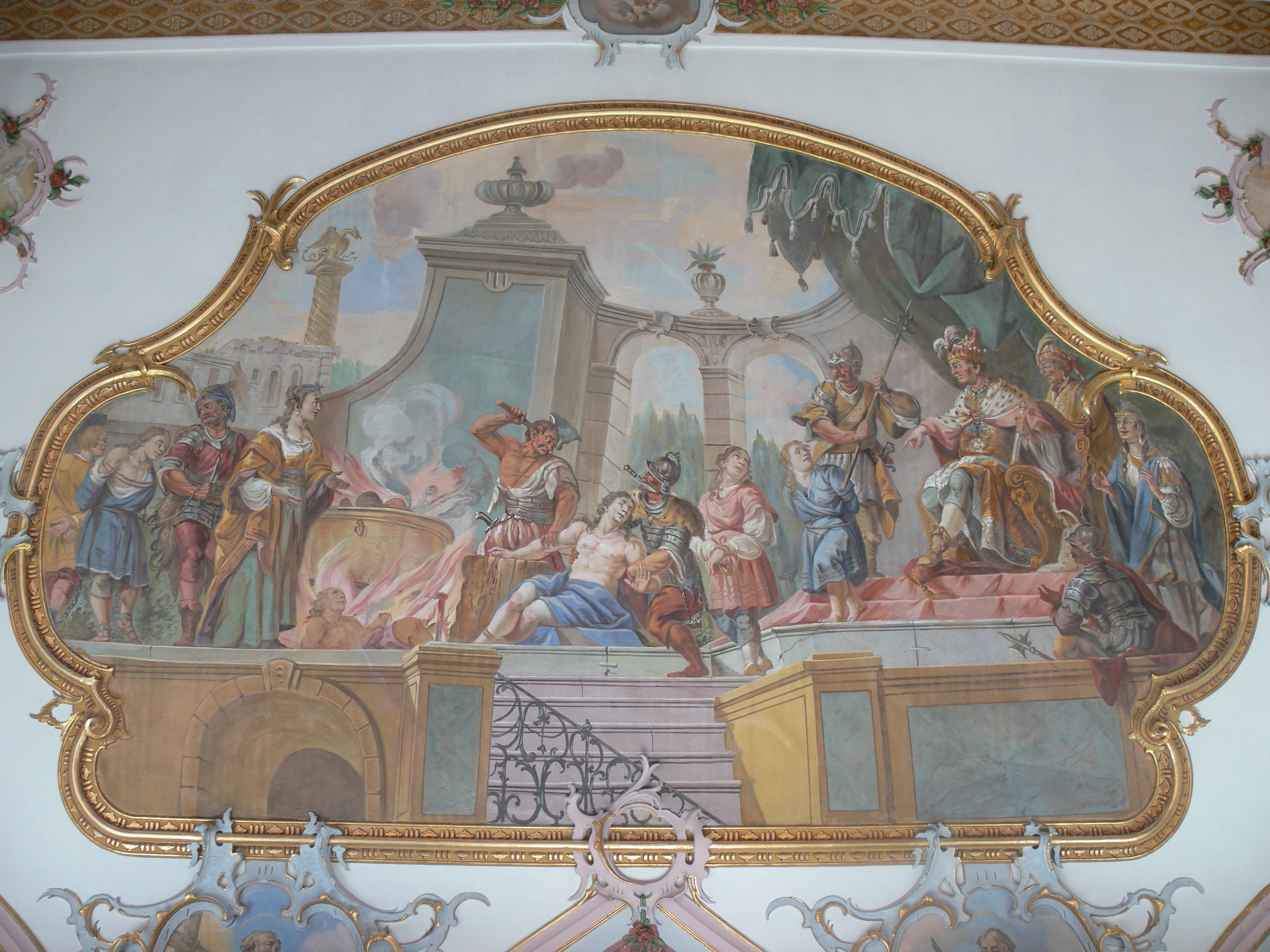 Pfarrkirche St. Pankratius, Wiggensbach Deckengemälde im nördlichen Querschiff: Franz Joseph Hermann: „Das Martyrium der sieben makkabäischen Brüder und ihrer Mutter (unter König Antiochus IV. Epiphanes)“ , 1771